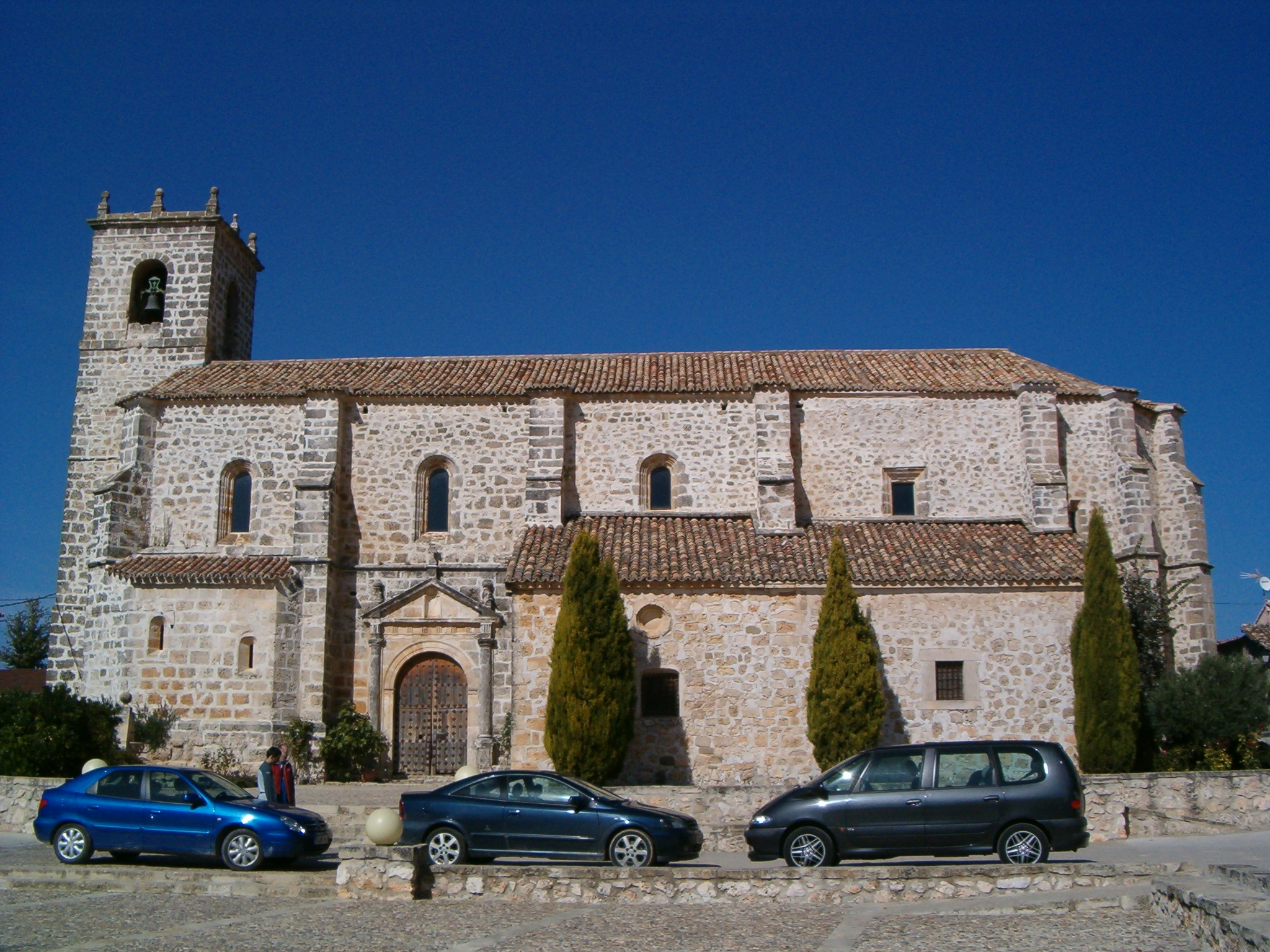 Iglesia de El Olivar (Guadalajara, Castilla-La Mancha, España).